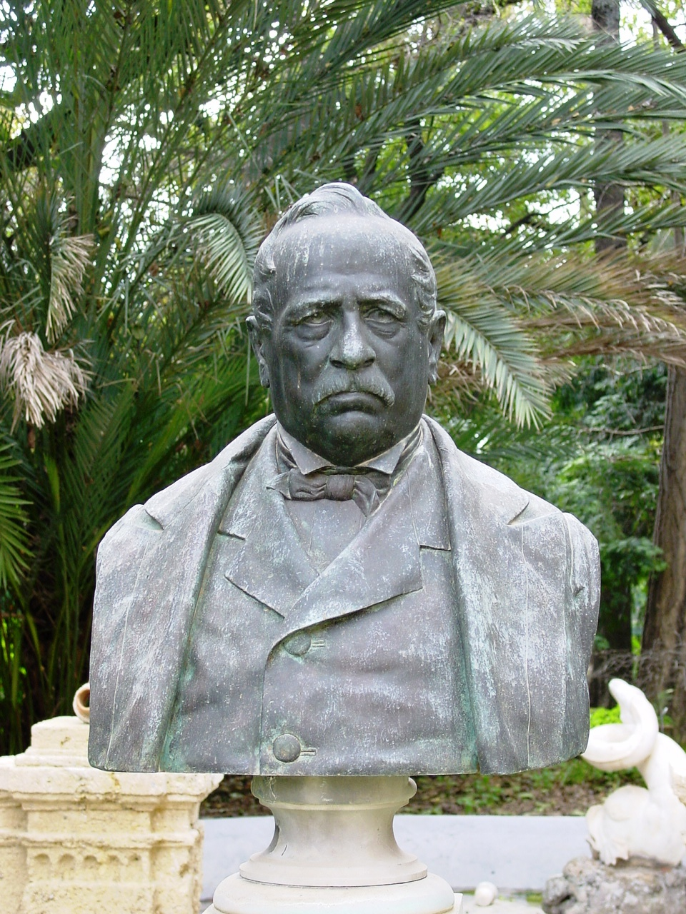 Agostino Todaro (1818-1892), italian botanist. Orto botanico di Palermo